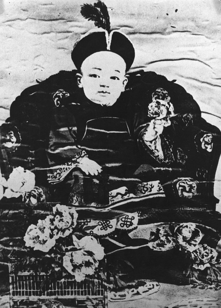 溥儀 (愛新覺羅 溥儀)， 宣統皇帝，油畫肖像，1908年。